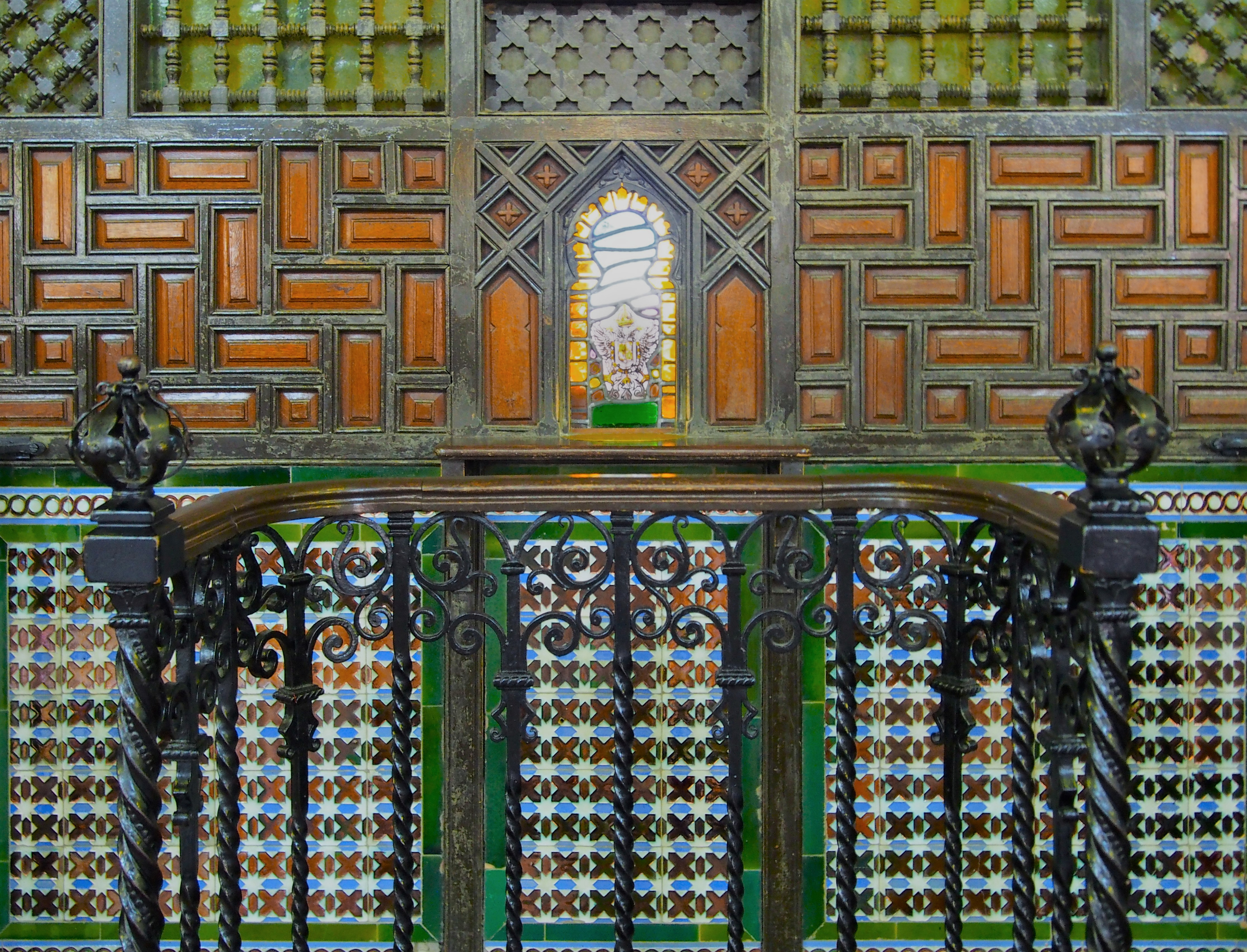 Podem contemplar l'estil neomudèjar i un gust harmonitzat dels colors. La vitrina central conté l'escut de la ciutat i a les bandes la bandera de l'Estat Espanyol.